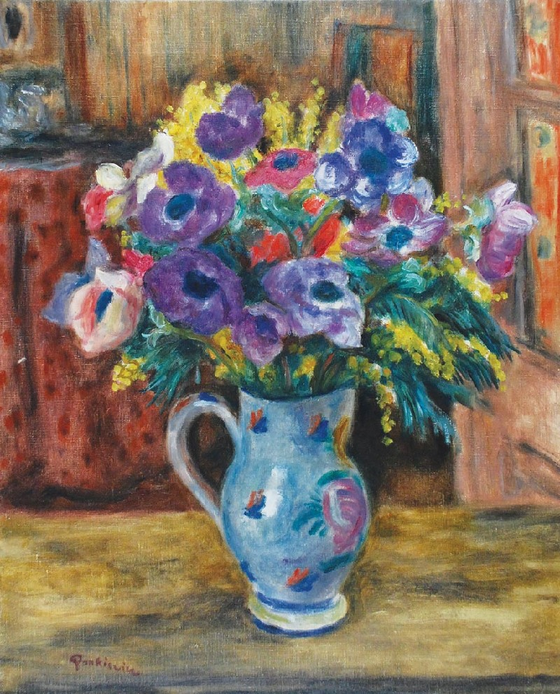 Anemony w wazonie